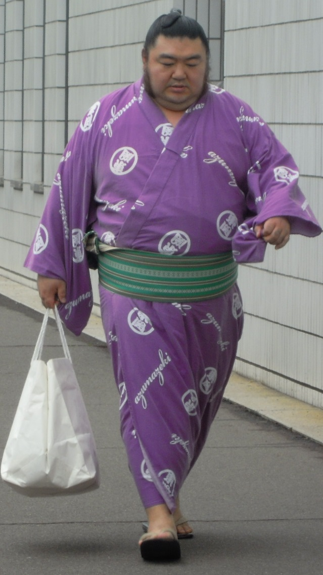 平成26年五月場所3日目、国技館入りする華王錦